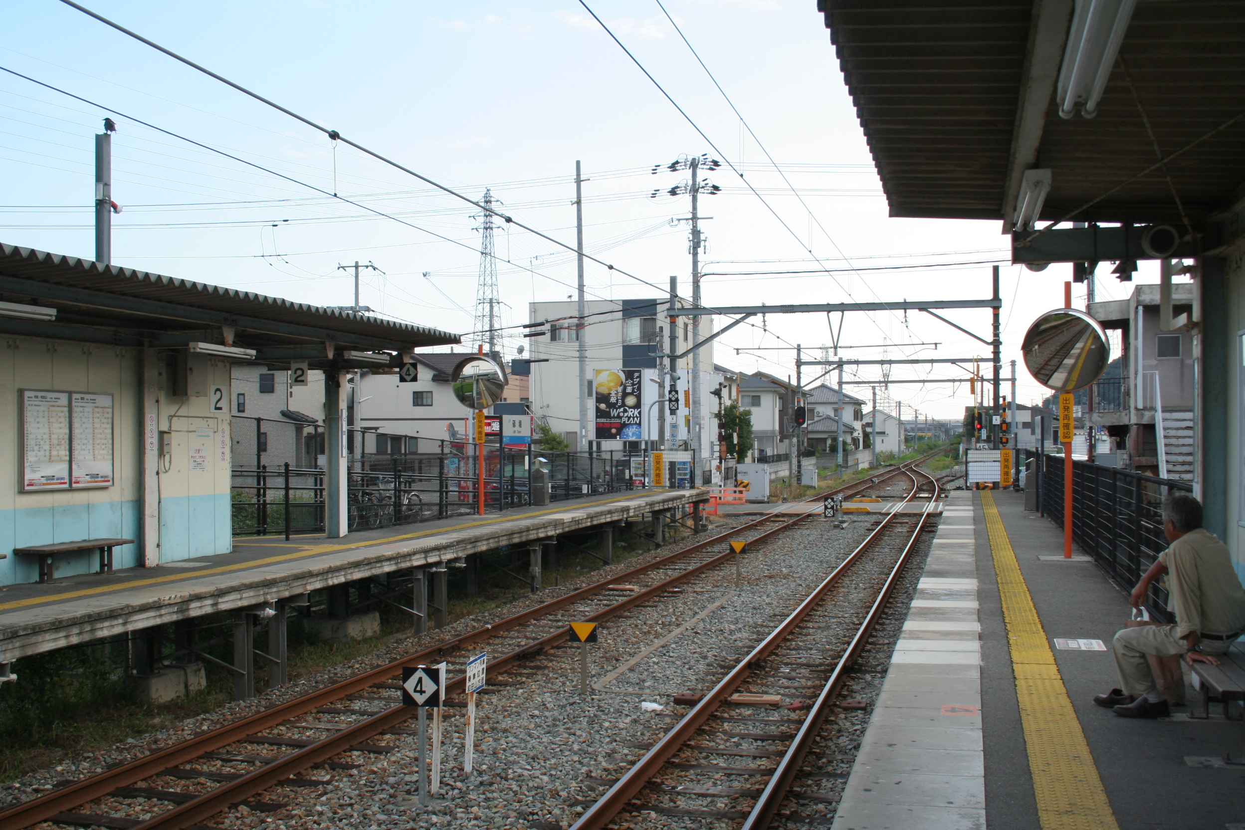 砥堀駅。播但線の鉄道駅。 1番線ホームから姫路駅などのある南西を撮影。駅には小さいが待合所がある。